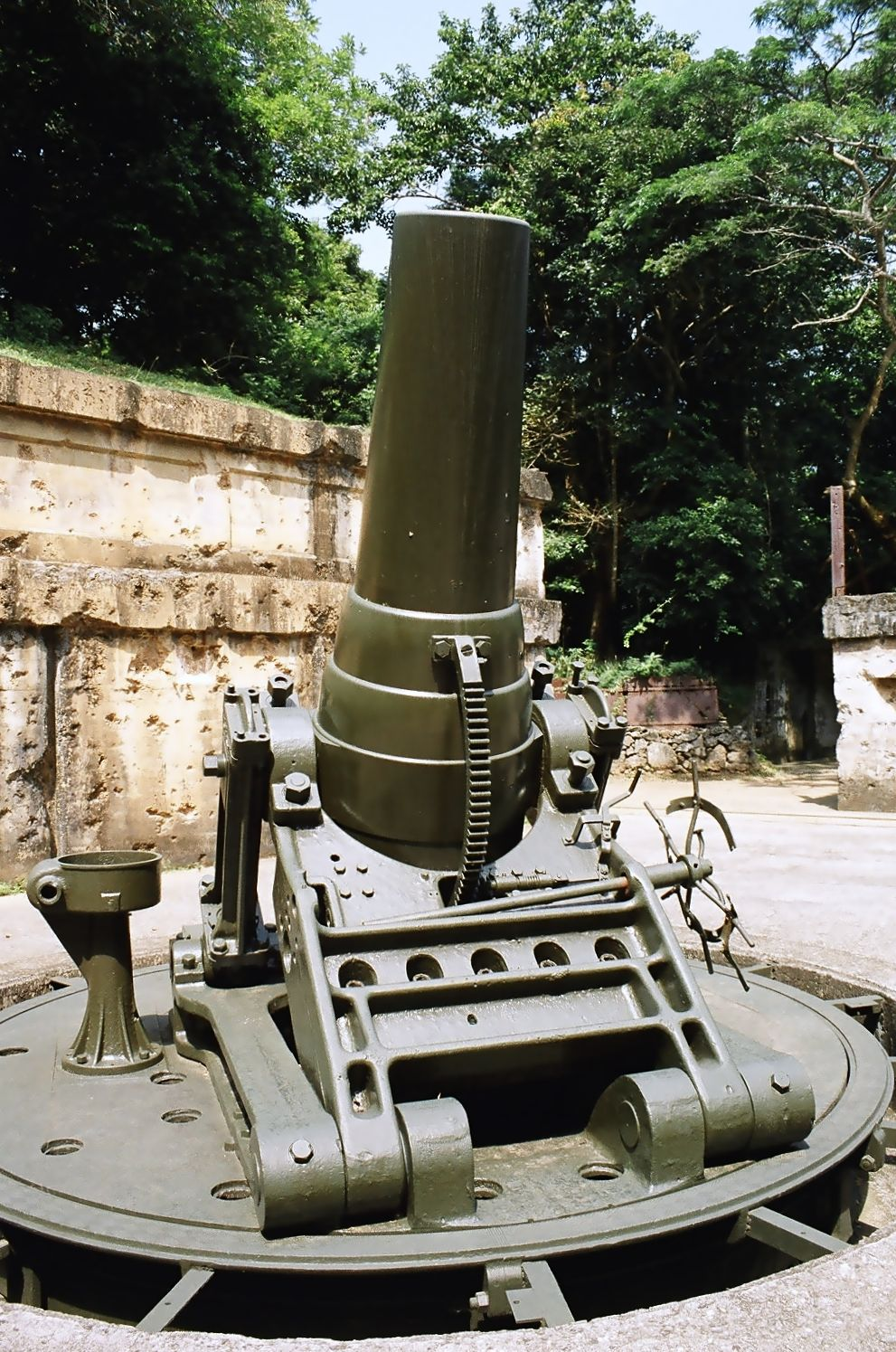 Canon, Corregidor, Philippines